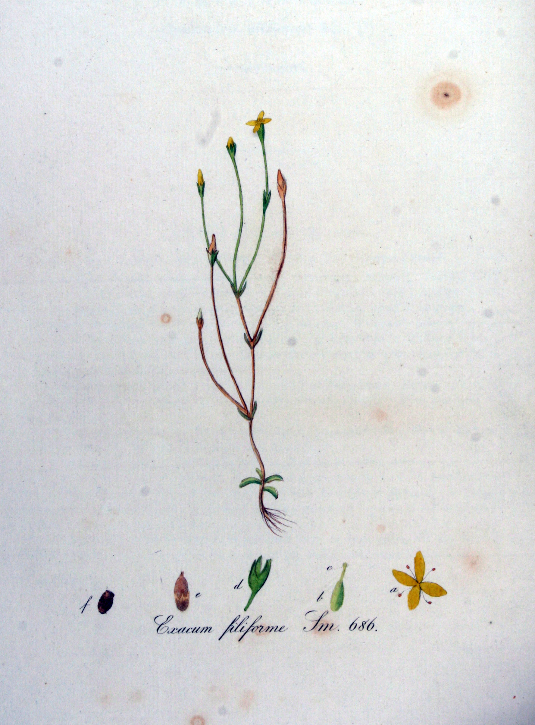 Cicendia filiformis (L.) Delarbre (Syn. Exacum filiforme (L.) Willd.)